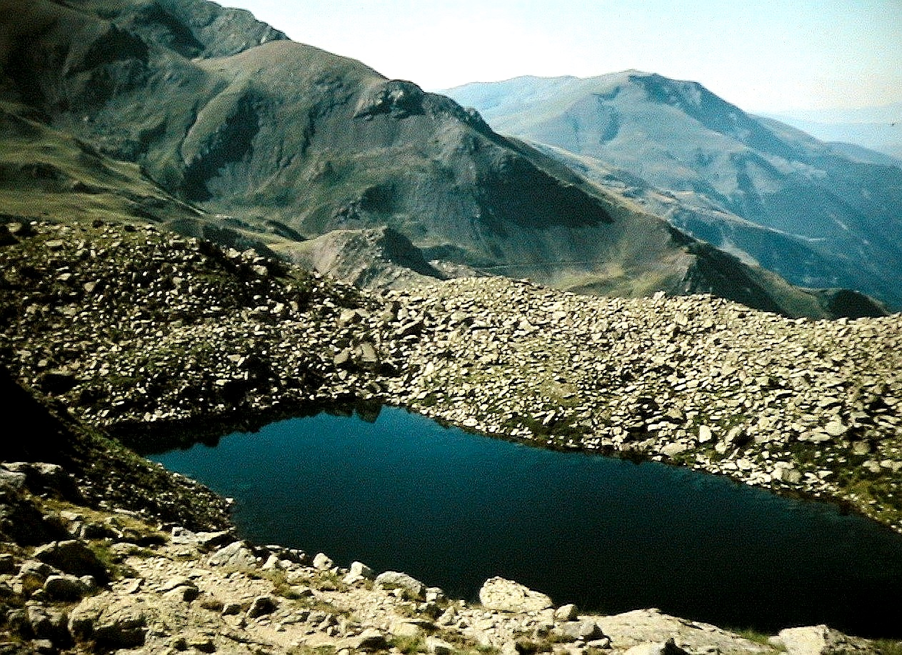 Una morrena de blocs granítics reté les aigües de l'Estany Xic de Colomina, a Cabdella. La Torre de Cabdella (Pallars Jussà - Catalunya). Foto presa de la projecció d'una diapositiva.